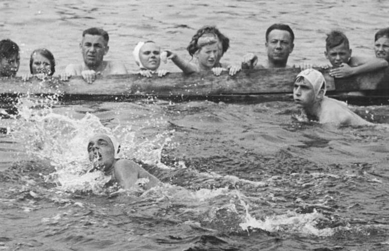 Stralsund, II. Meeresmeisterschaften der DDR, Teilnehmer Illus Quasch 27.8.1951 Die II. Meeresmeisterschaften der DDR wurden am 26.8.1951 im Sund zwischen Altefähr auf Rügen und Stralsund (Seebadeanstalt) von 286 Sportlerinnen und Sportlern ausgetragen. UBz: Zwei Schwimmer erreichen das Ziel, erwartet von sportfreudigen Zuschauern. Leihweise Illus Berlin W 8 x Information added by Wikimedia users.Das Bild zeigt Teilnehmer einer Veranstaltung des Sundschwimmens.